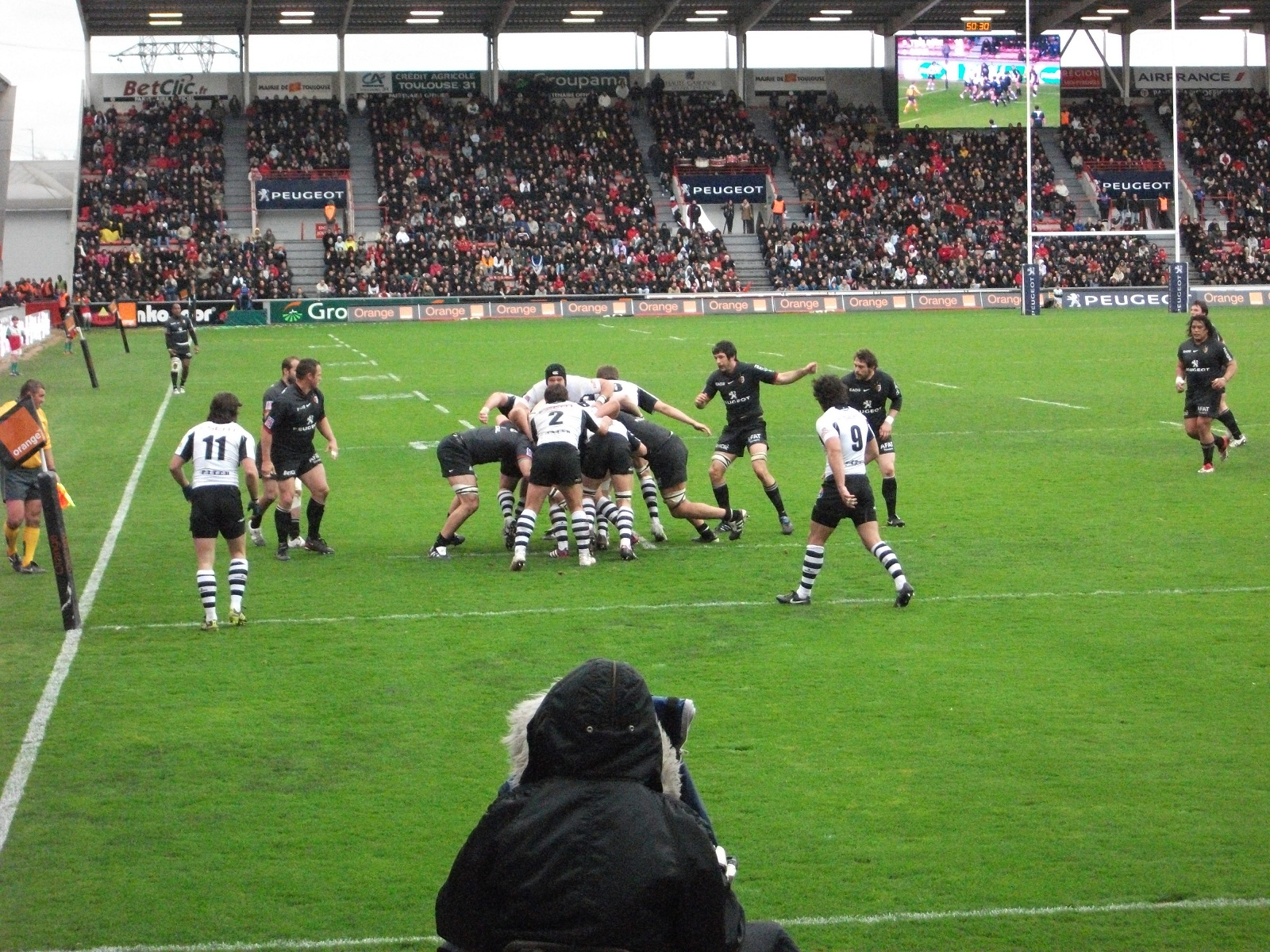 22e journee Stade Toulousain Brive